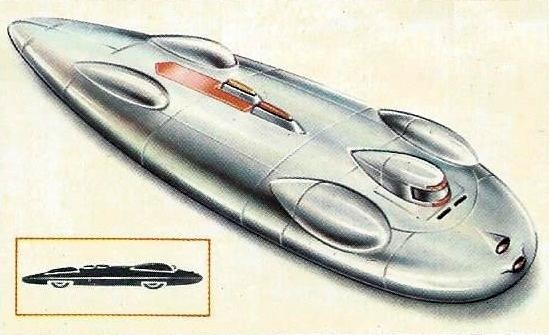 Railton Special 1947 (RM avec John Cobb à 634.39 kmh)